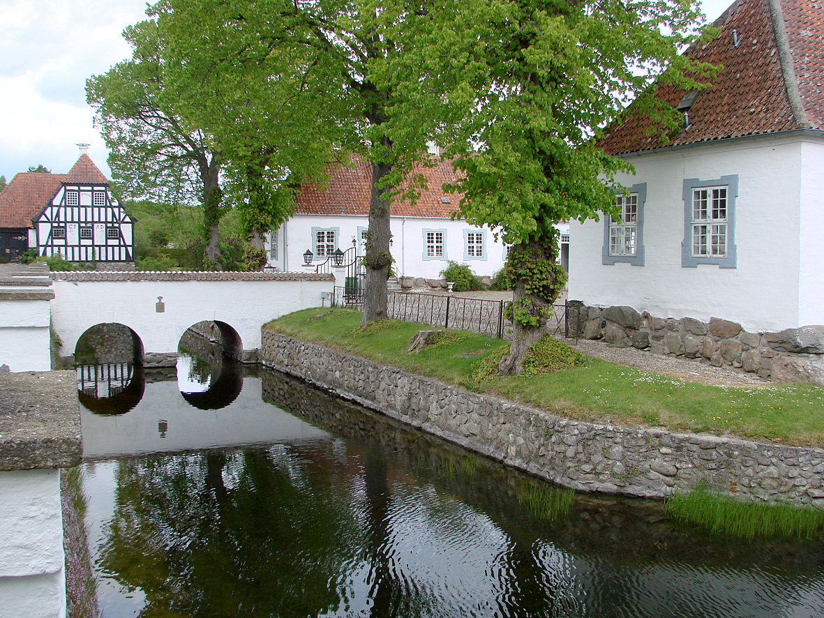 Gjessinggård - broen over voldgraven